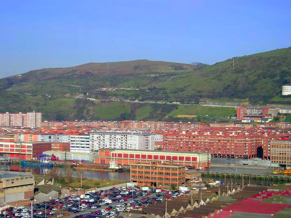 Barrios de Zorrozaurre y San Ignacio en Bilbao.